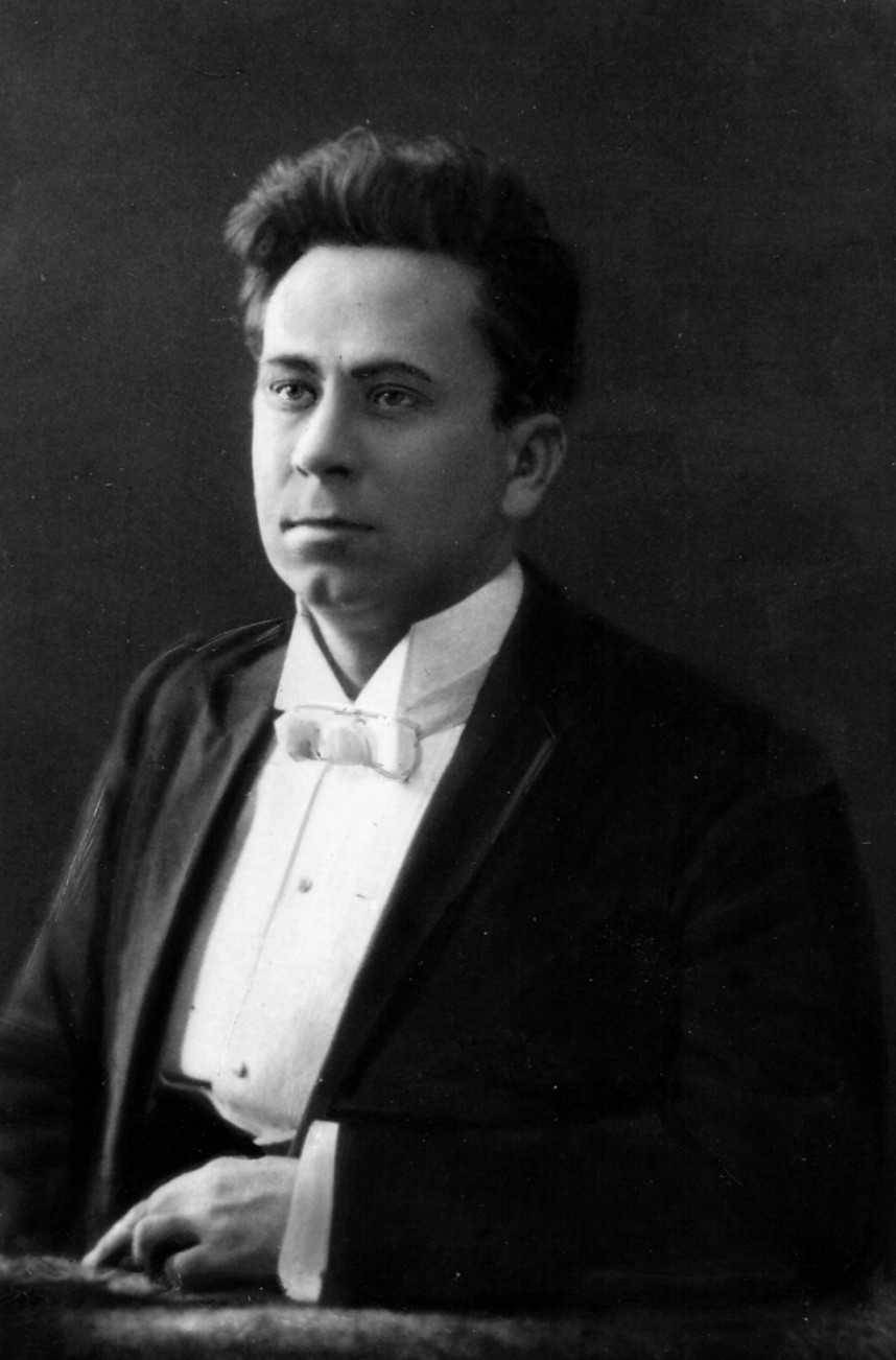 Феофан Павловский (1881-1936) - оперный певец (баритон)